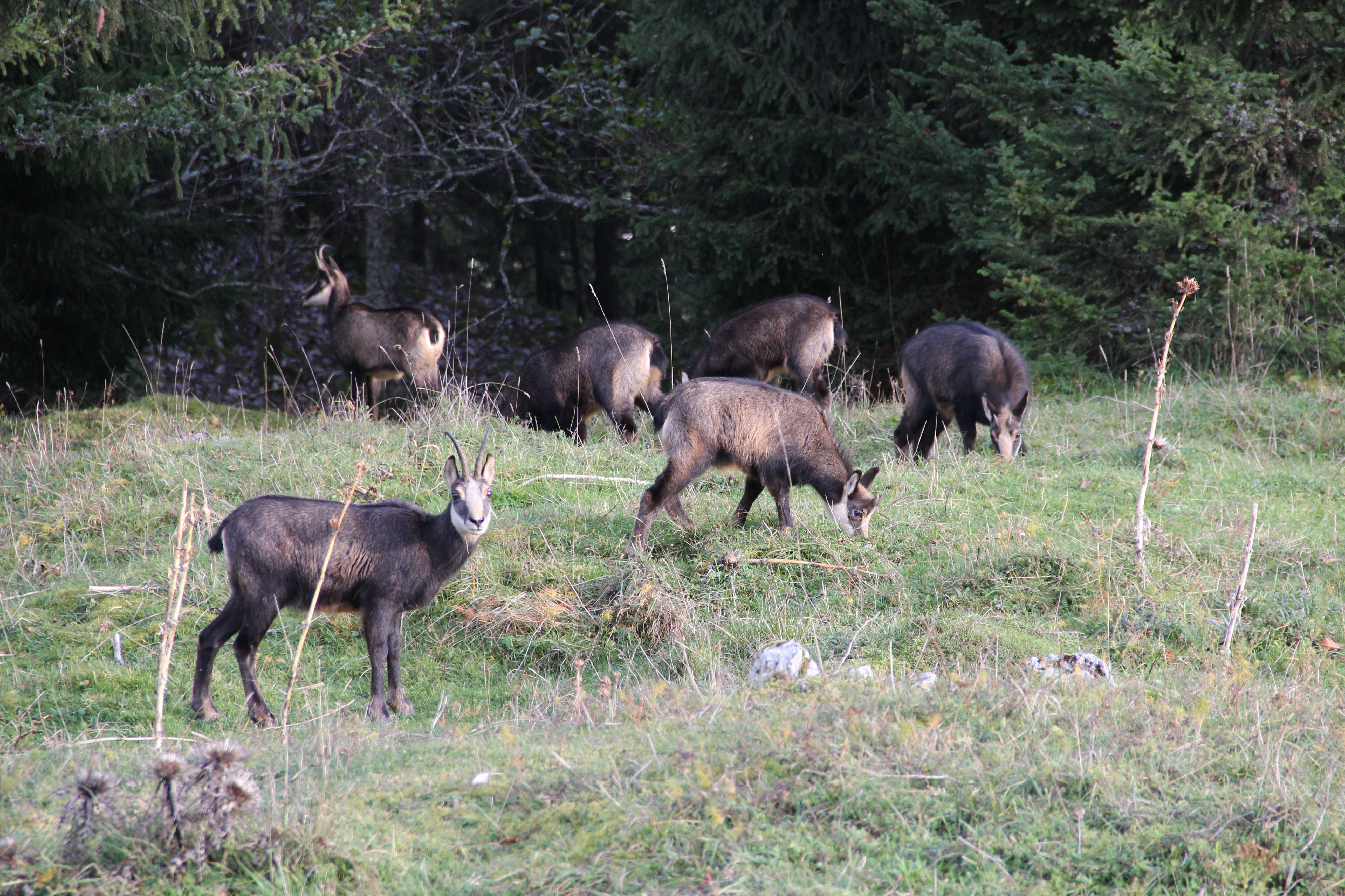 Chamois